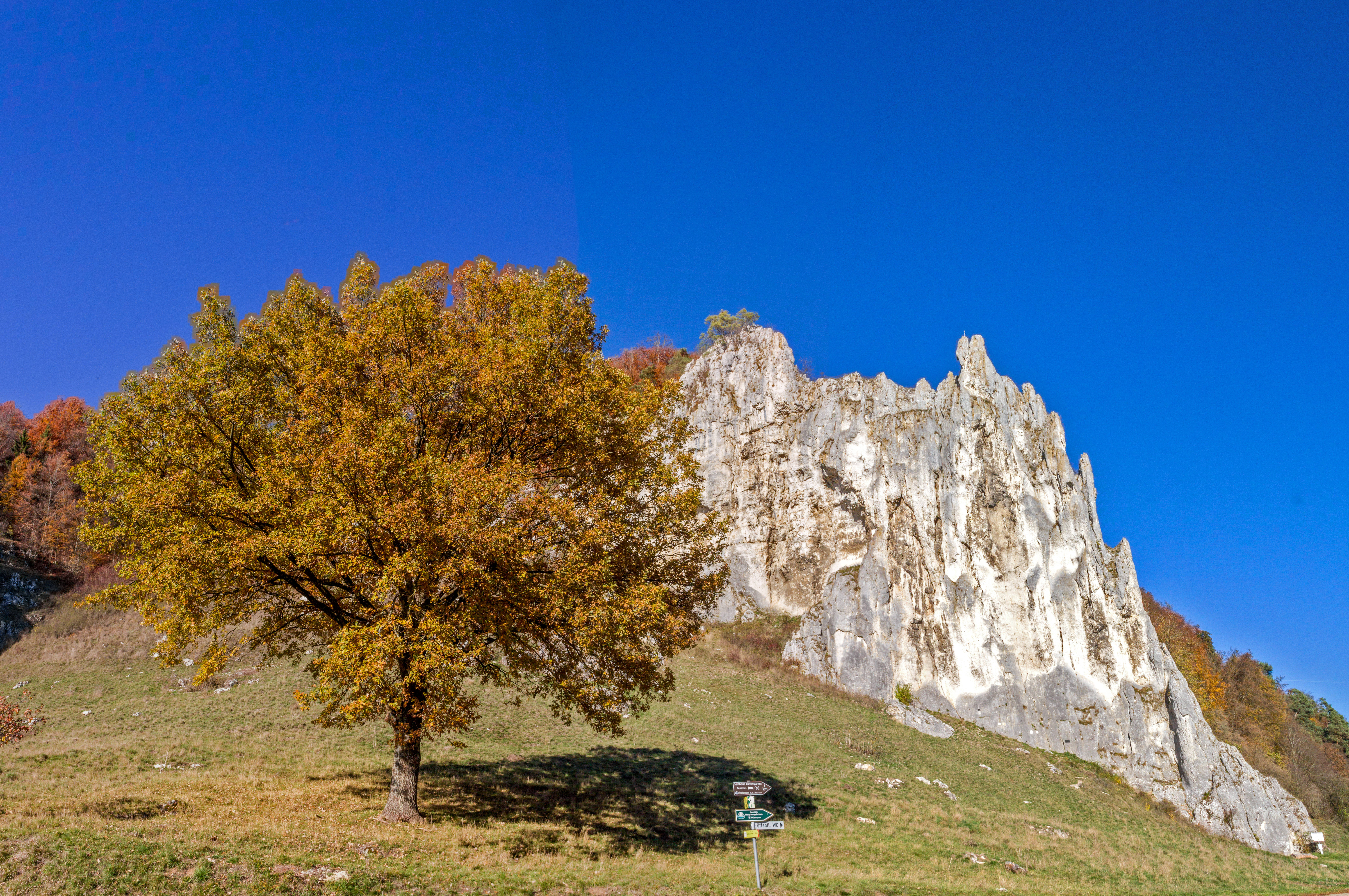 Wellheim, Dohlenstein, Geotop